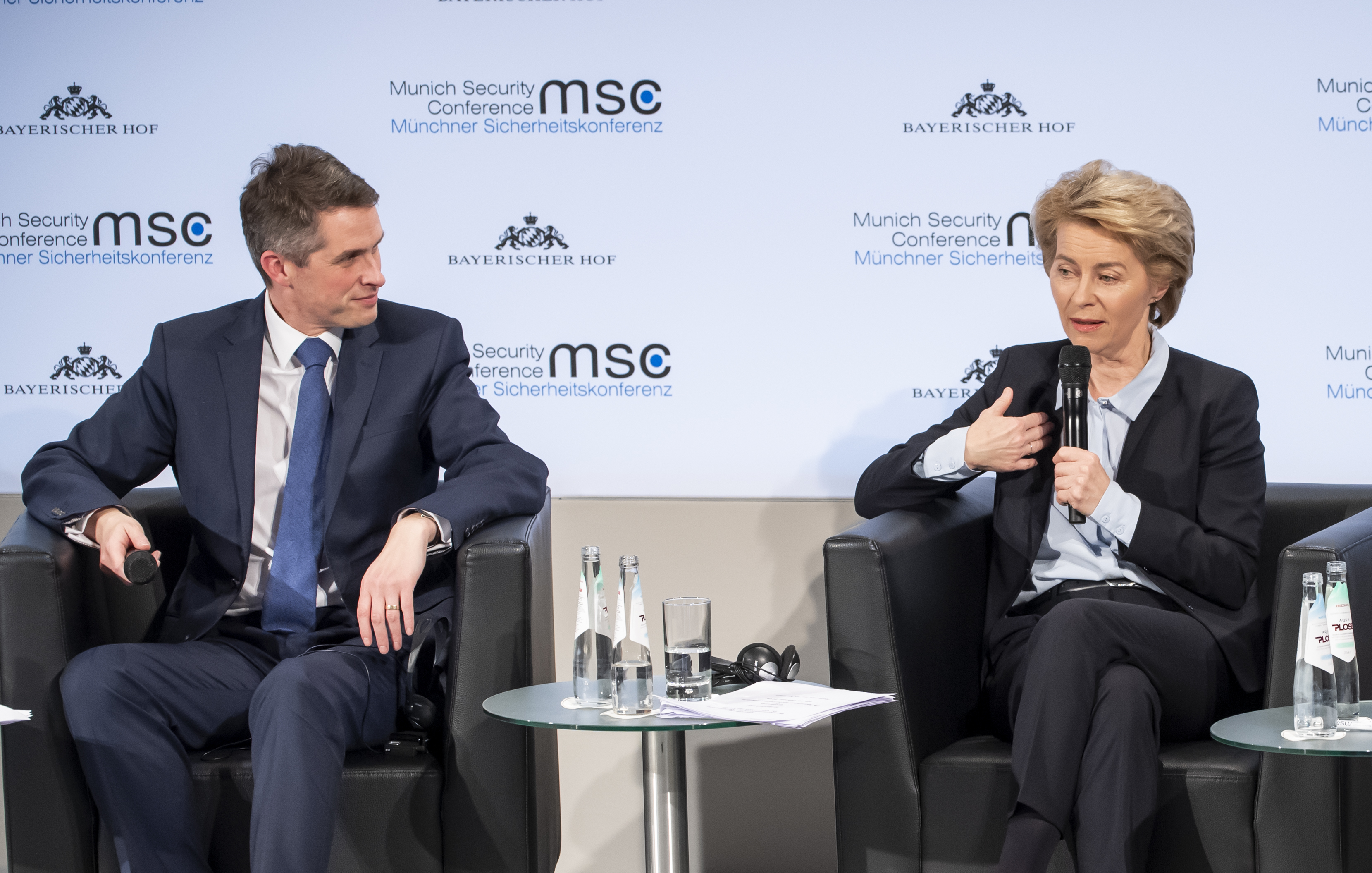 Gavin Williamson, Ursula von der Leyen und Wolfgang Ischinger während der Münchener Sicherheitskonferenz 2019